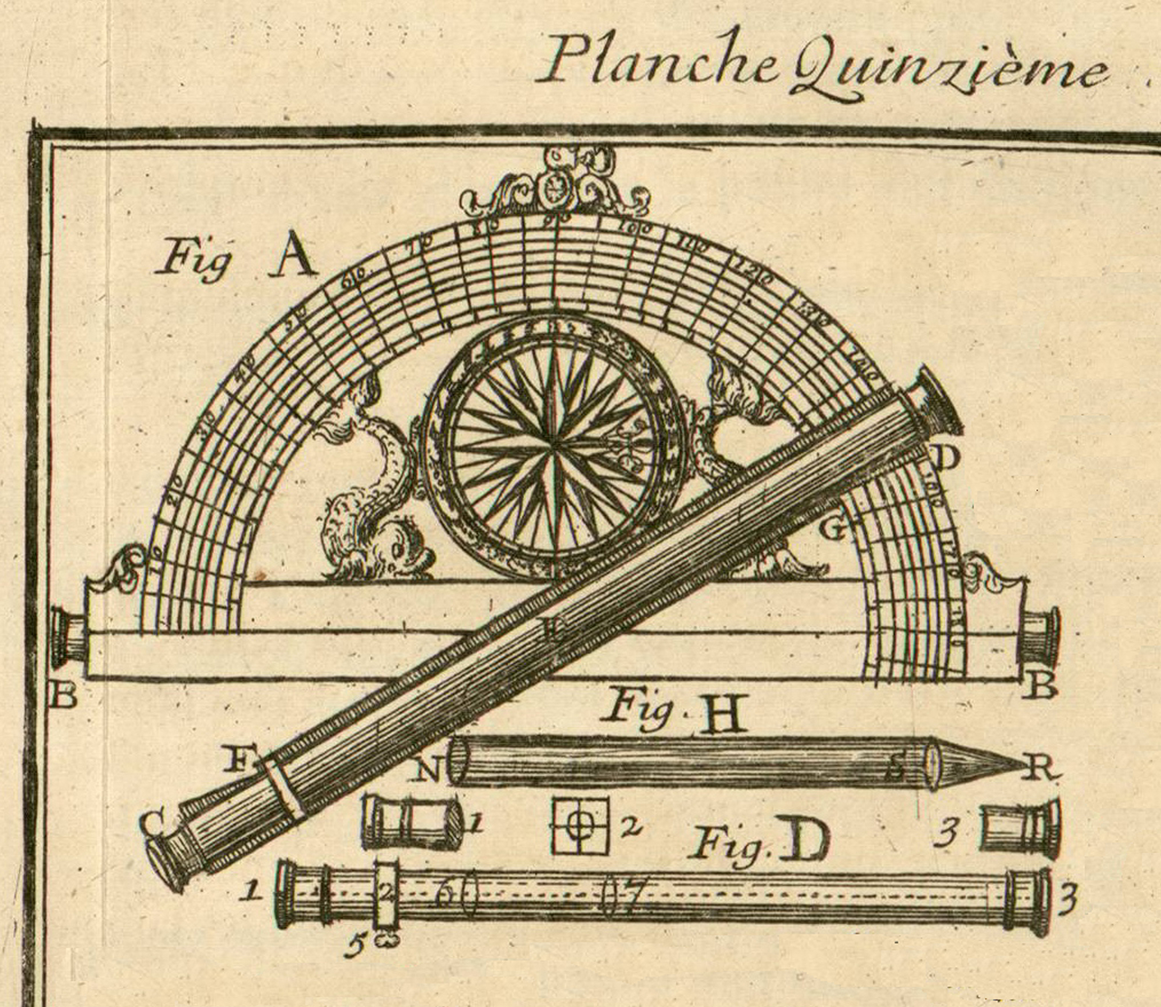 Graphomètre à deux lunettes ; division du limbe par transversales.